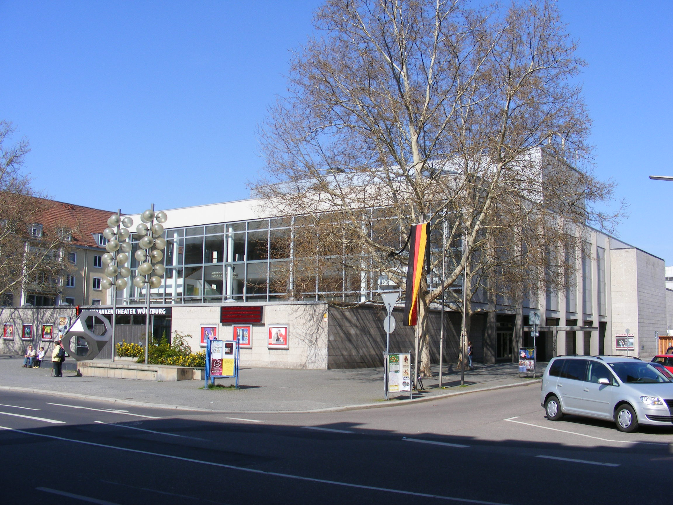 Würzburg - Mainfrankentheater, Außenansicht